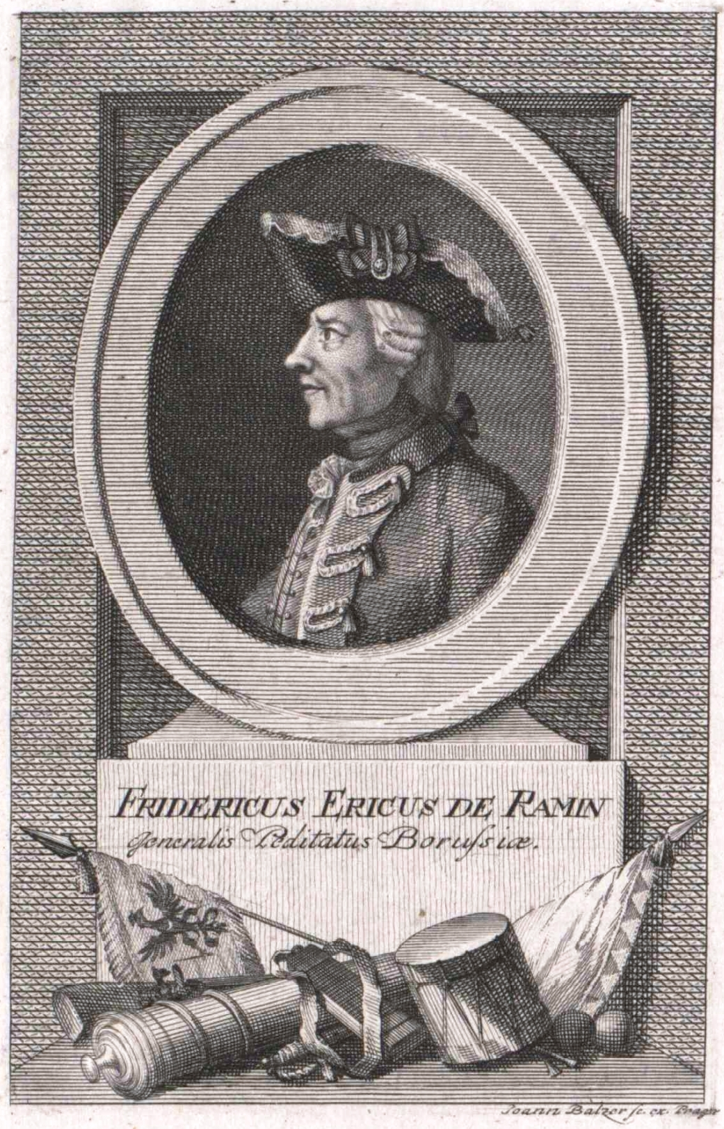 Portrait of Friedrich Ehrenreich von Ramin (1709–1782)